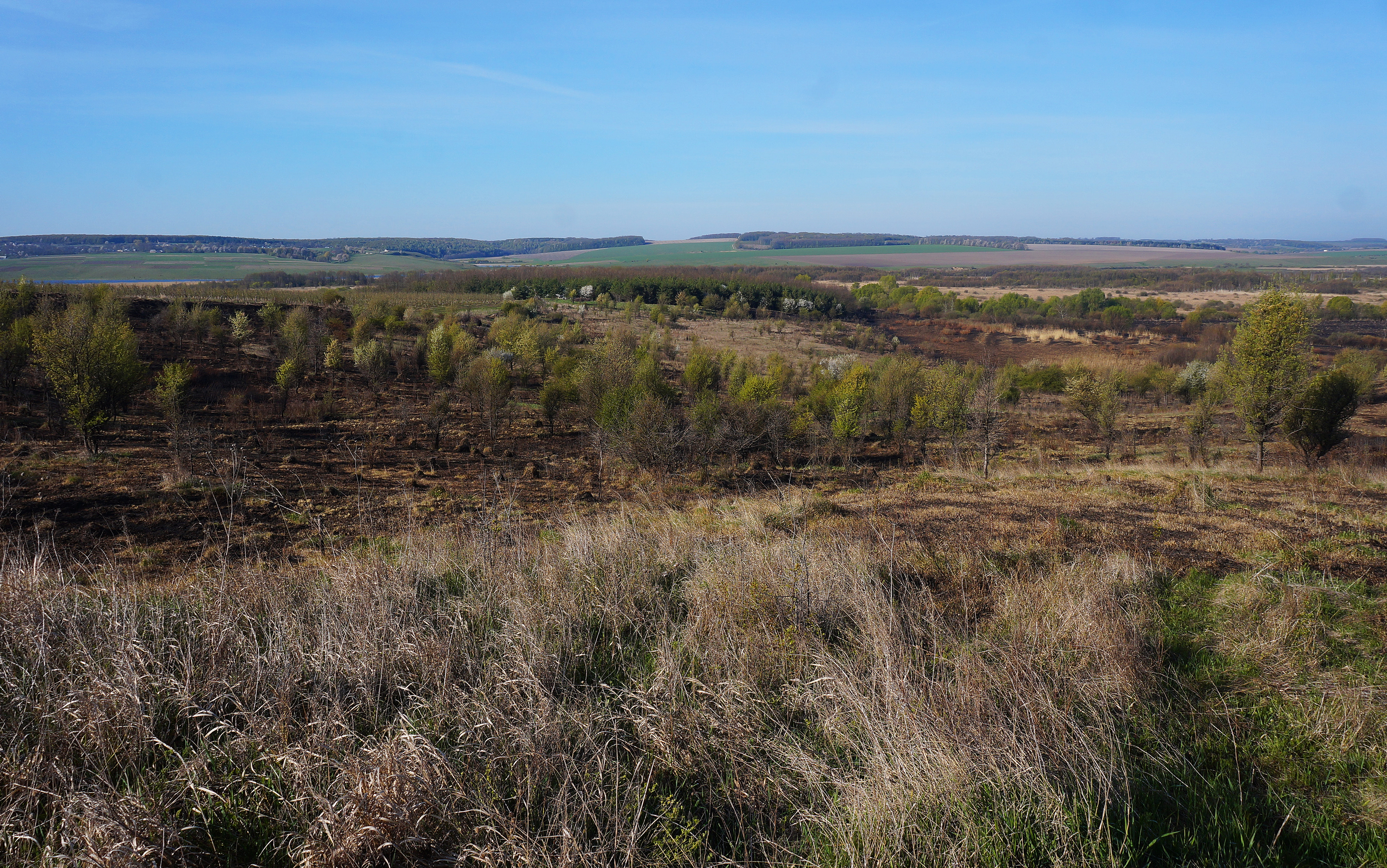 Урочище Шиянецьке, Барський район, с. Гайове, Гаєвська сільська рада